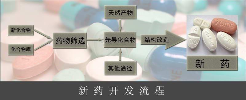 新药开发示意图自制图片